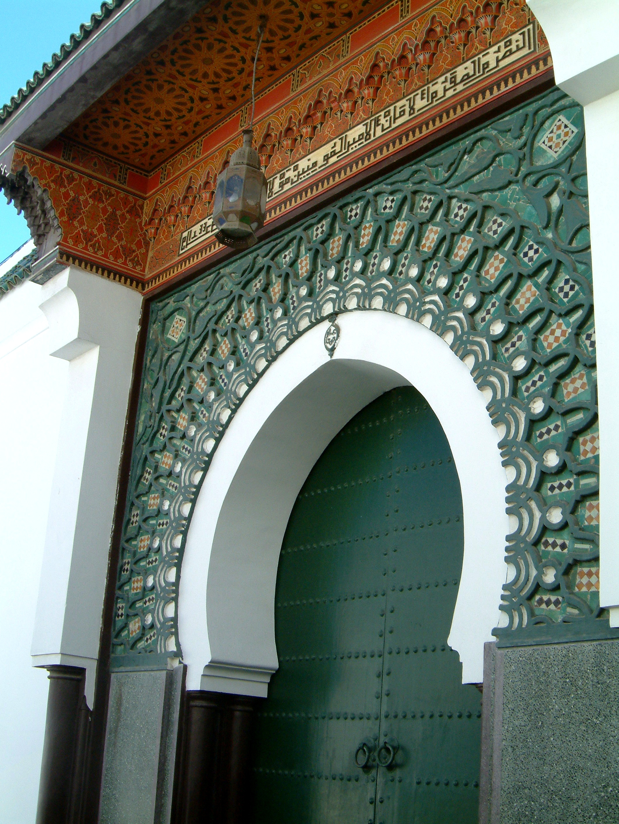 Tanger: An der Moschee